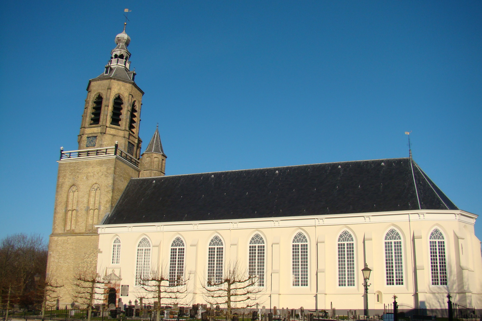 Hervormde Kerk van Dronryp